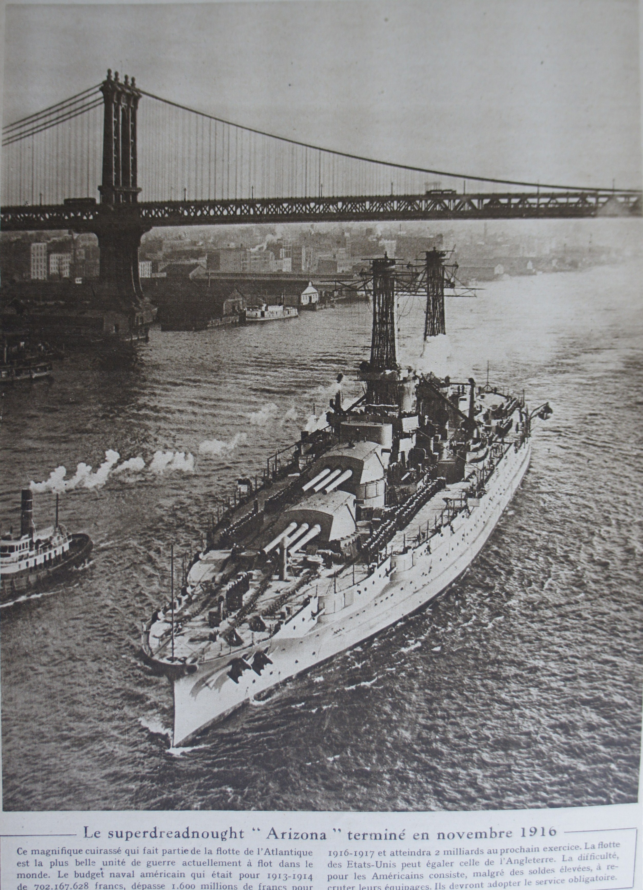 extrait du journal "le miroir".